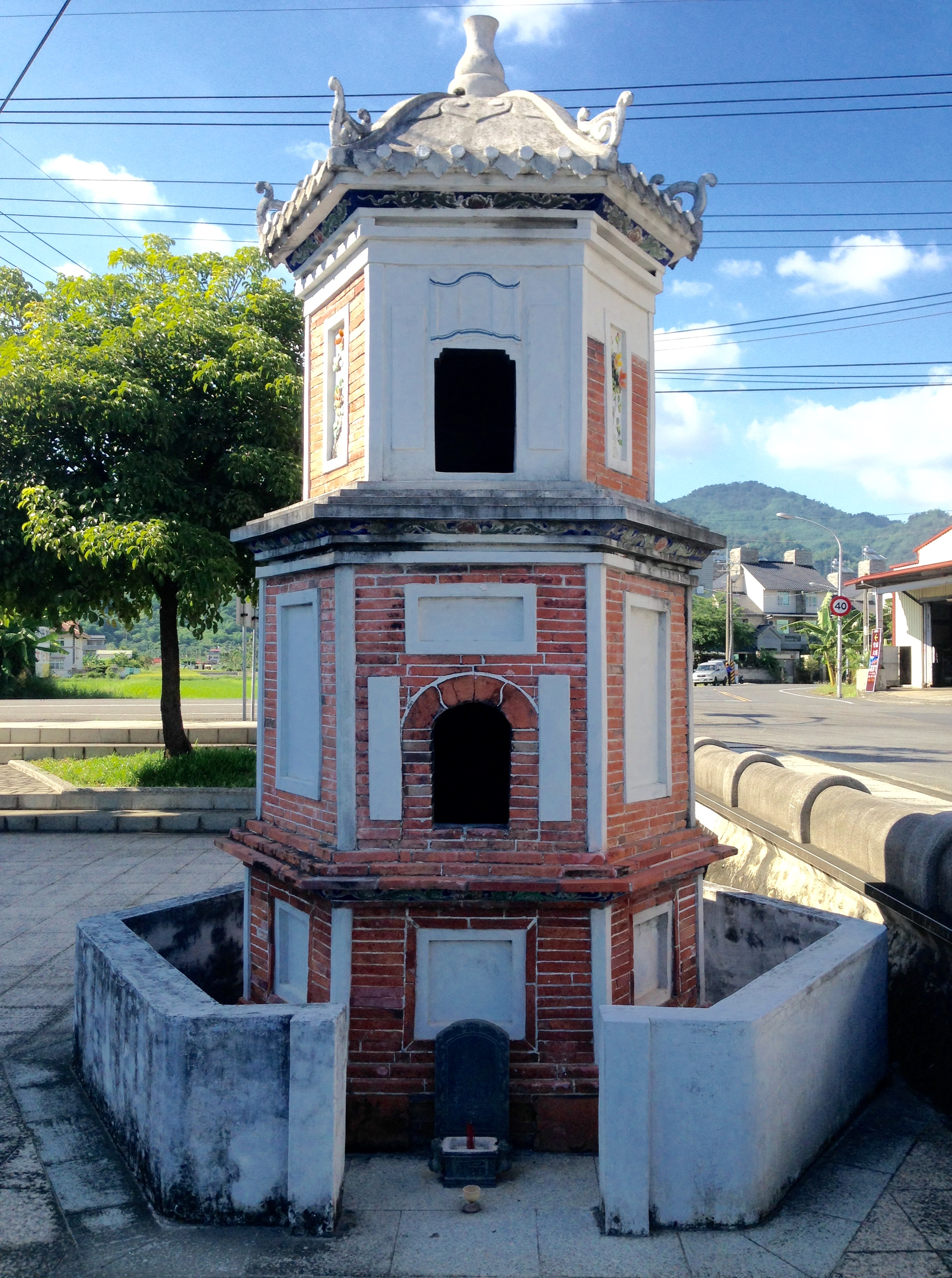 中文（台灣）: 瀰濃莊敬字亭